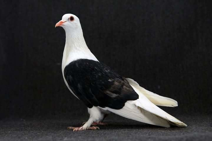 Старорусские кружастые1